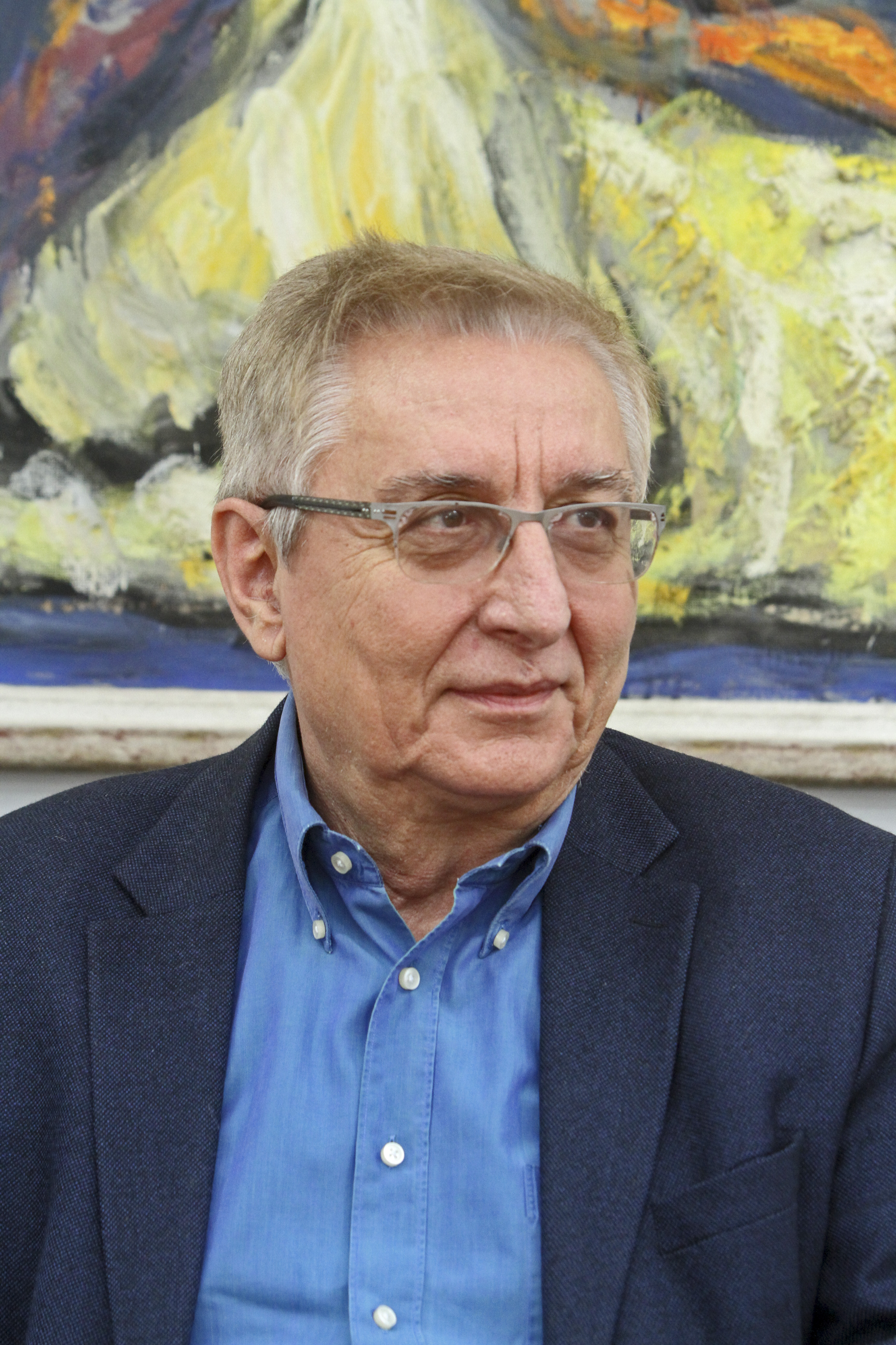 Стеван Пилиповић